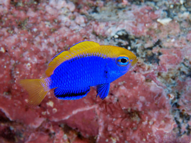 セナキルリスズメダイ Chrysiptera starcki